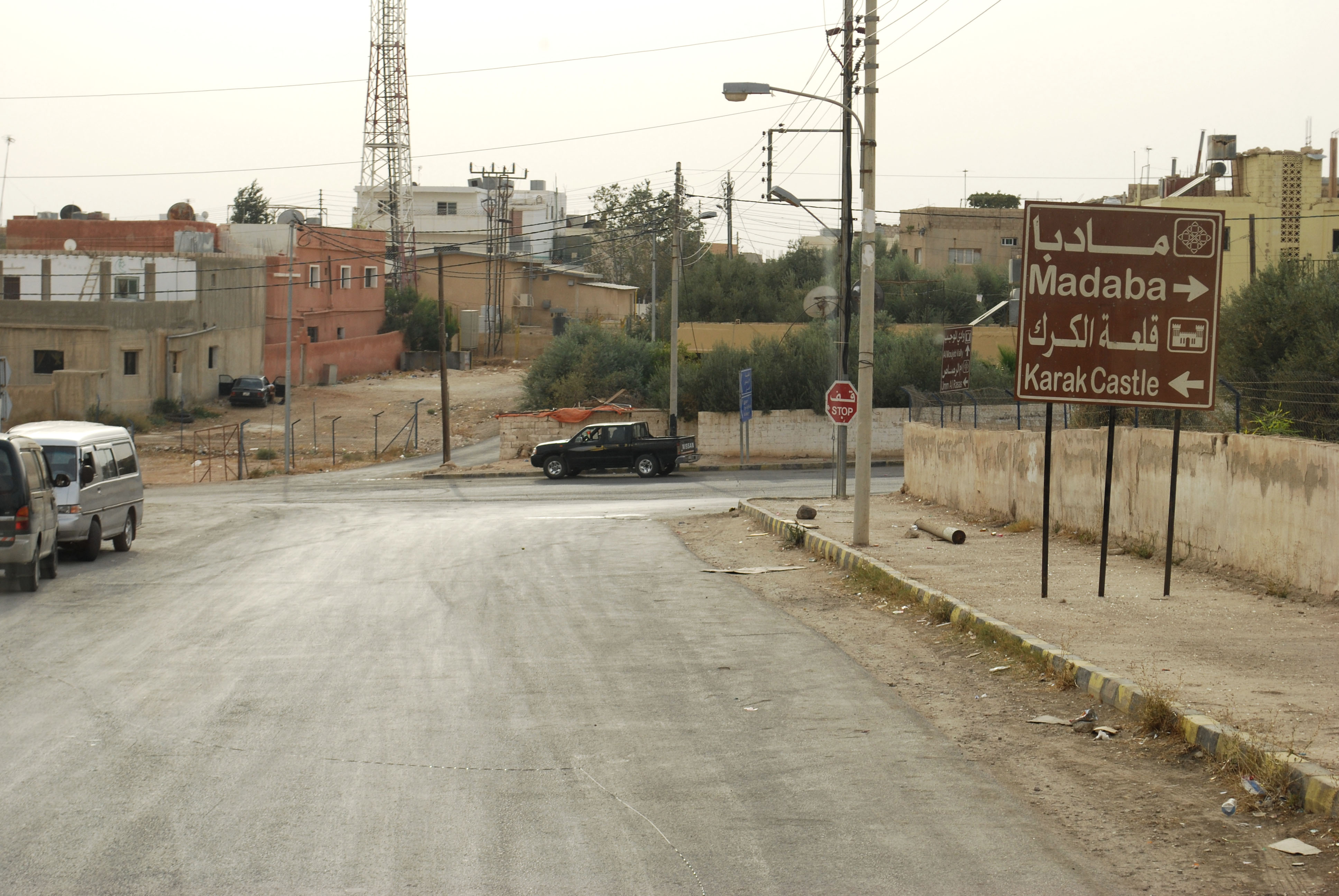 Carrefour entre la route venant de Umm ar-Rasas et la route n° 35 Amman-Aqaba ("Route des Rois").